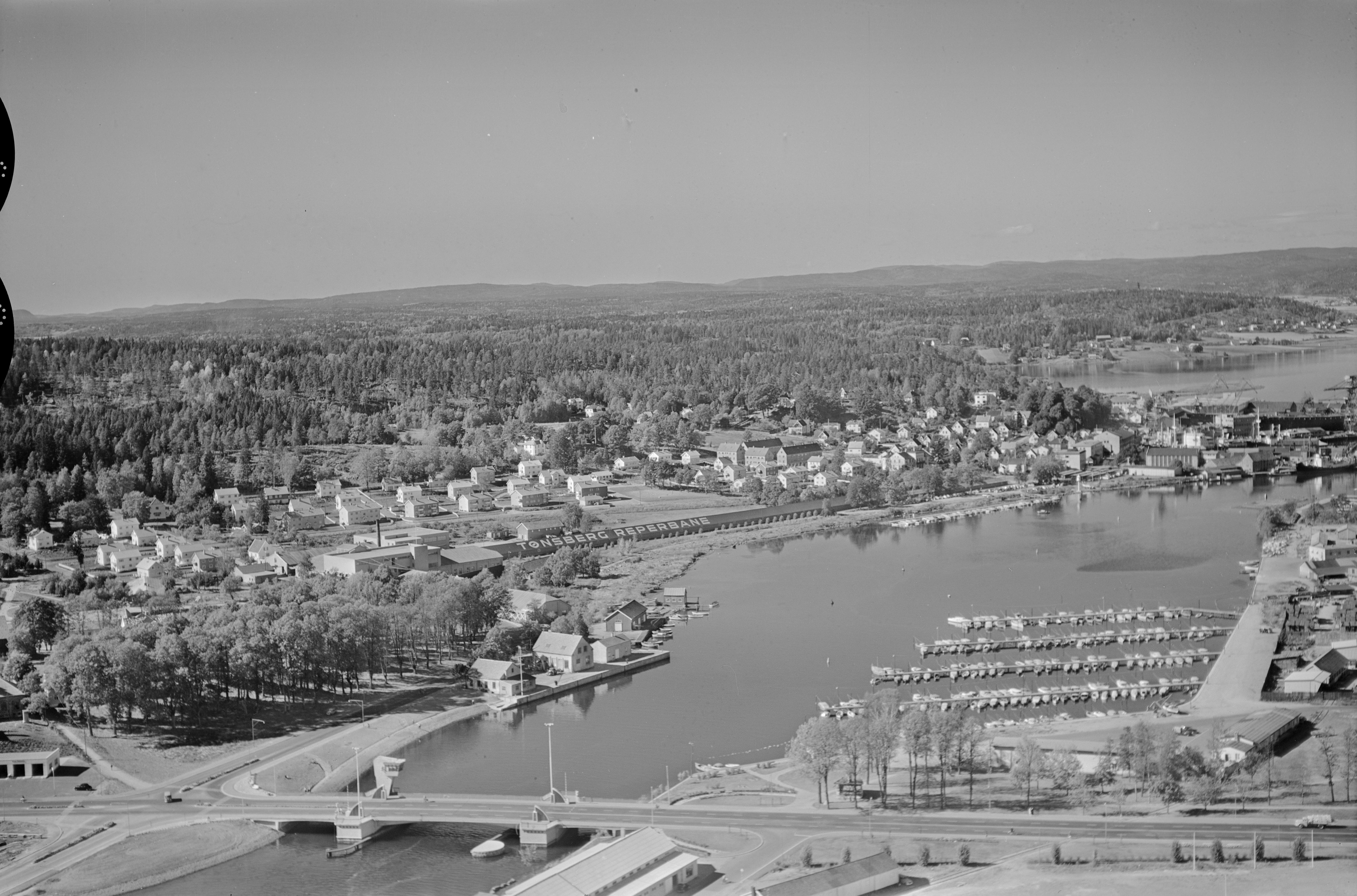 WF.S.137706